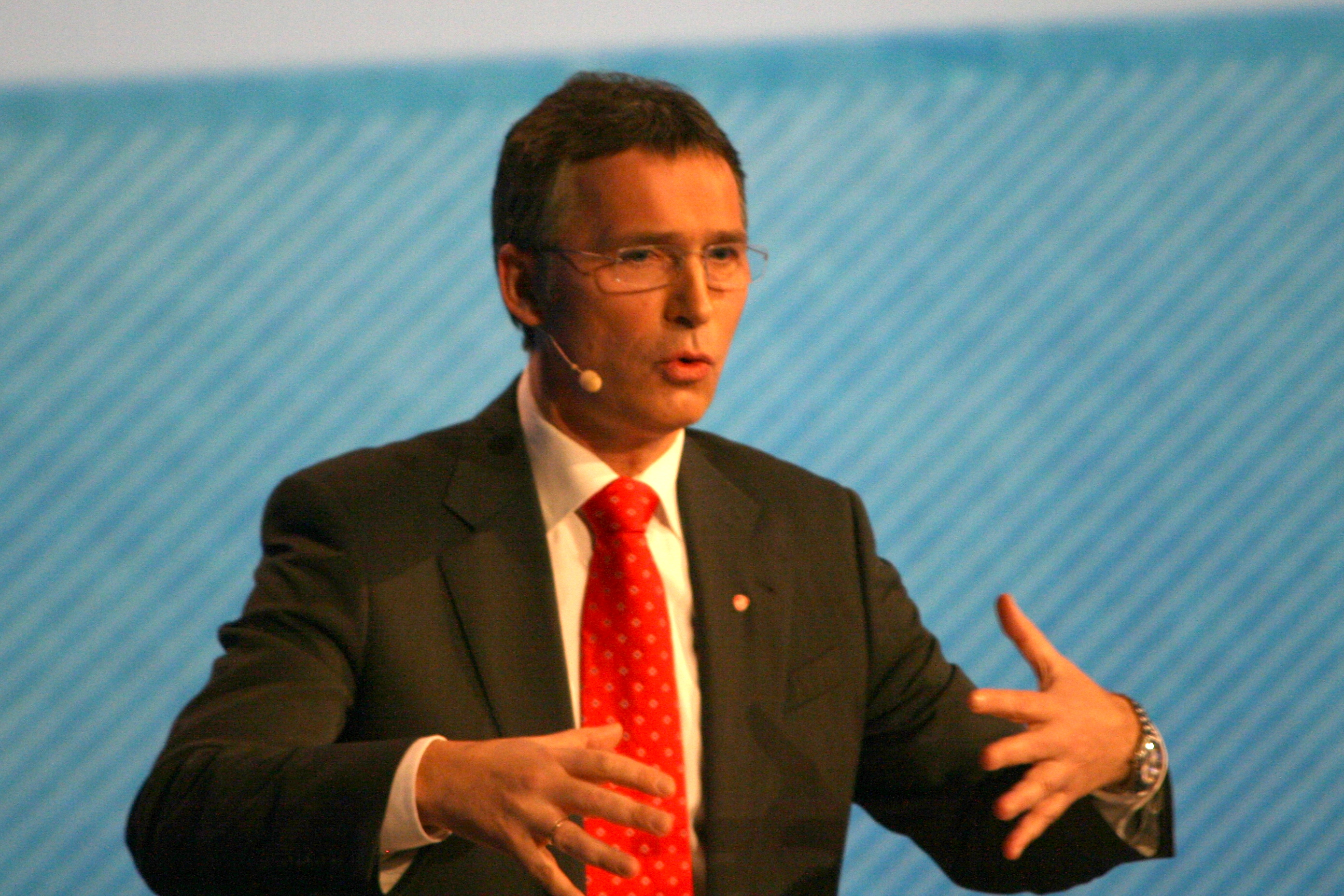 Jens Stoltenberg, statsminister i Norge. Fra NHOs Årskonferanse 2009.